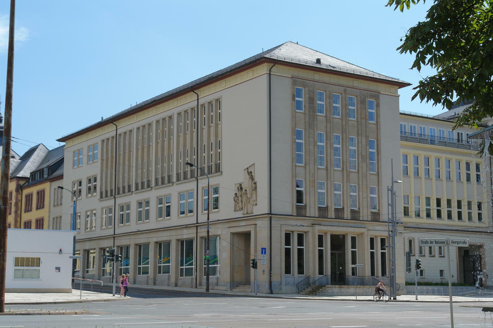 TU Chemnitz, Eckhaus an der Straße der Nationen, Ecke Georgstraße